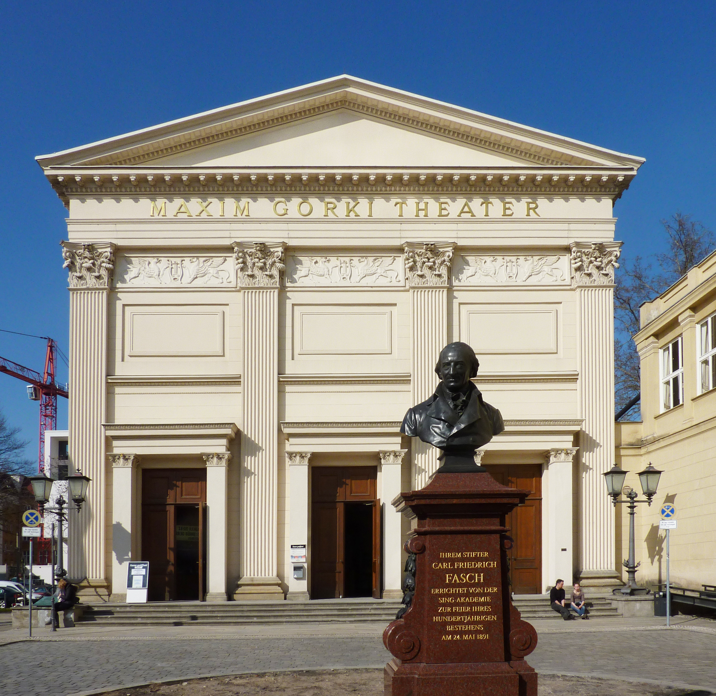 vor der ehemaligen Singakademie die Replik der Fasch-Büste von Gustav Blaeser